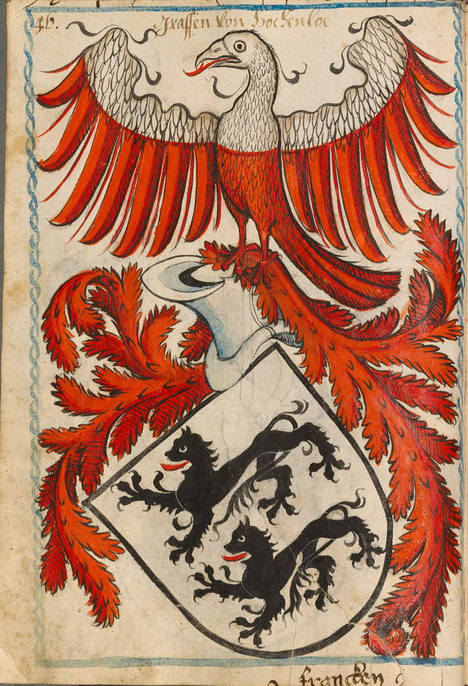 Scheibler'sches Wappenbuch , älterer Teil Hohenlohe